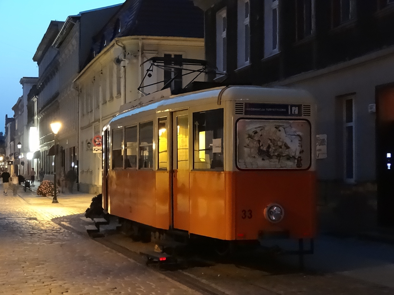 Ulica Długa w Bydgoszczy